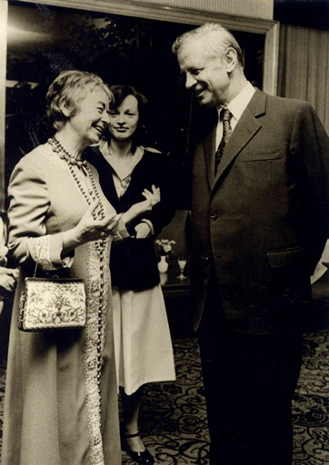 rachelceglaberlinexb